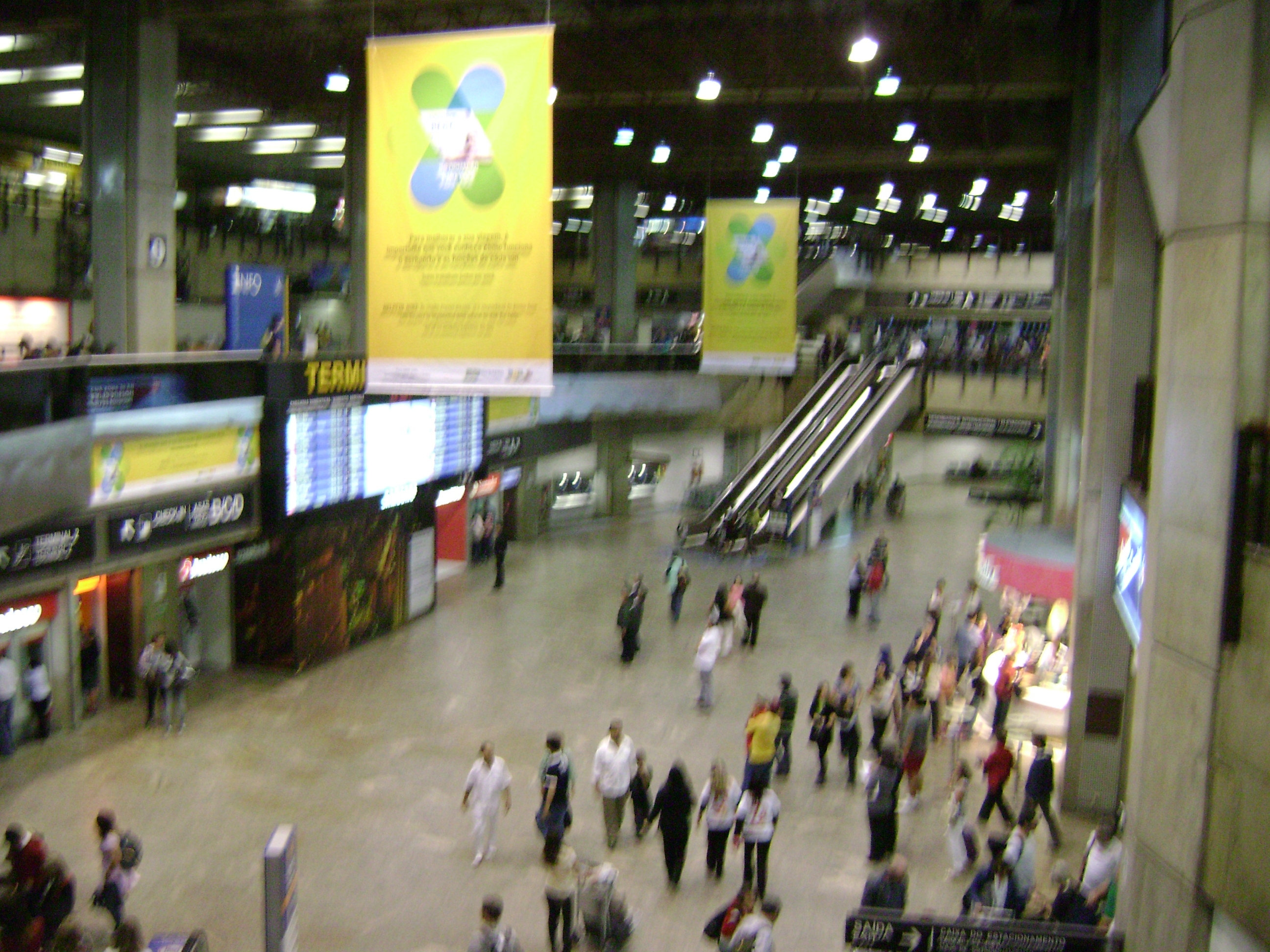 Interior do aeroporto de Guarulhos.